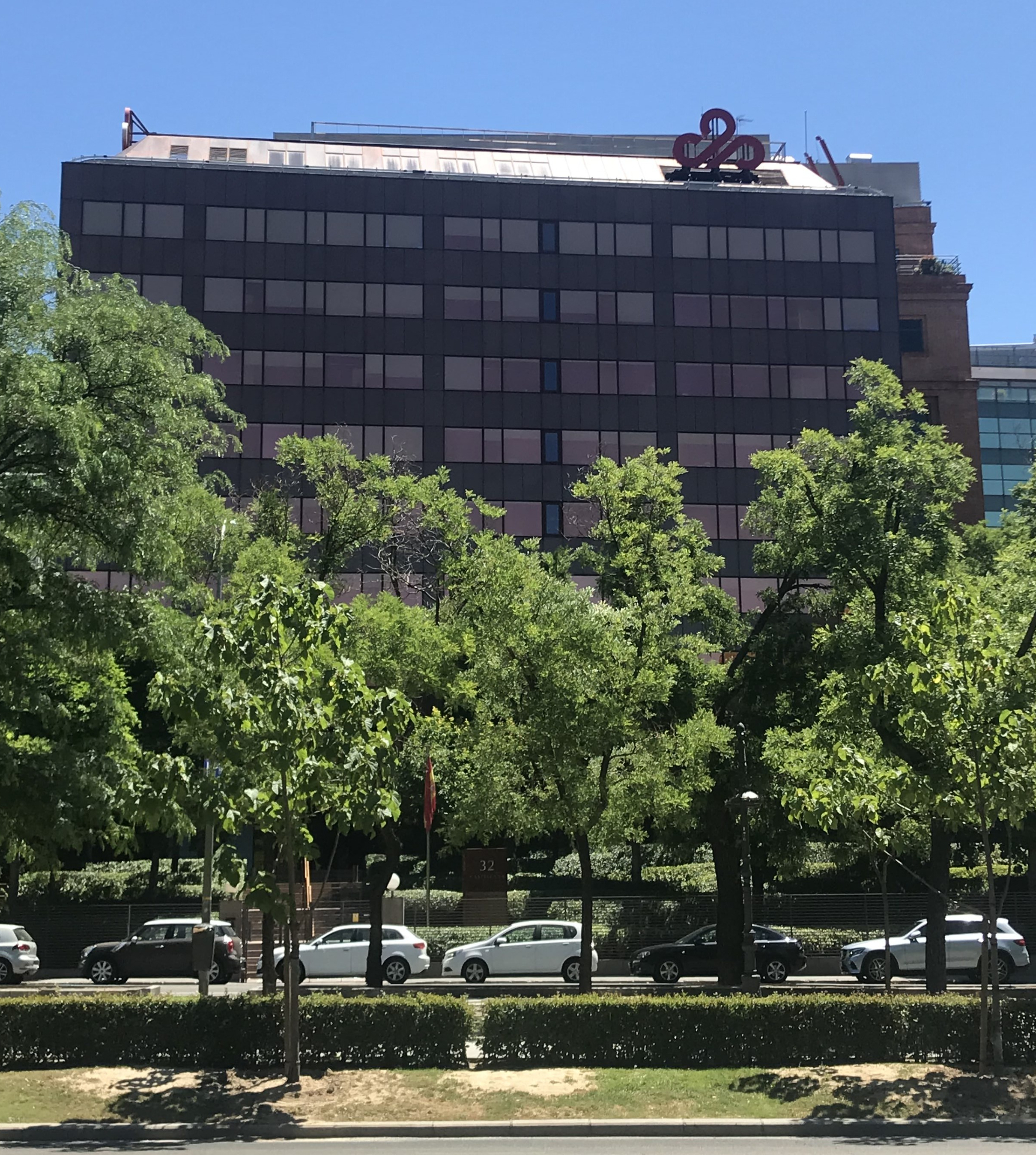 Paseo de la Castellana 32, Madrid